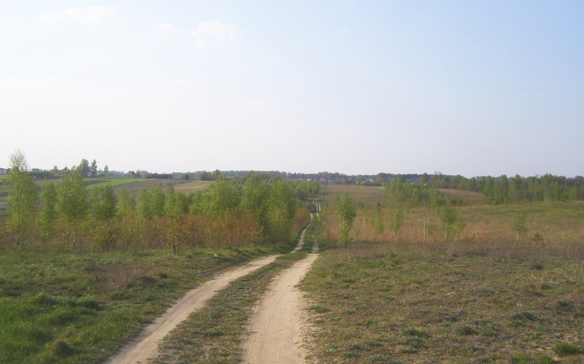 wiejski krajobraz osiedla Sikawa. Rolniczy krajobraz Wzniesień Łódzkich pomiędzy ulicami Beskidzką i Opolską (w tle dolina rzeki Łódki).